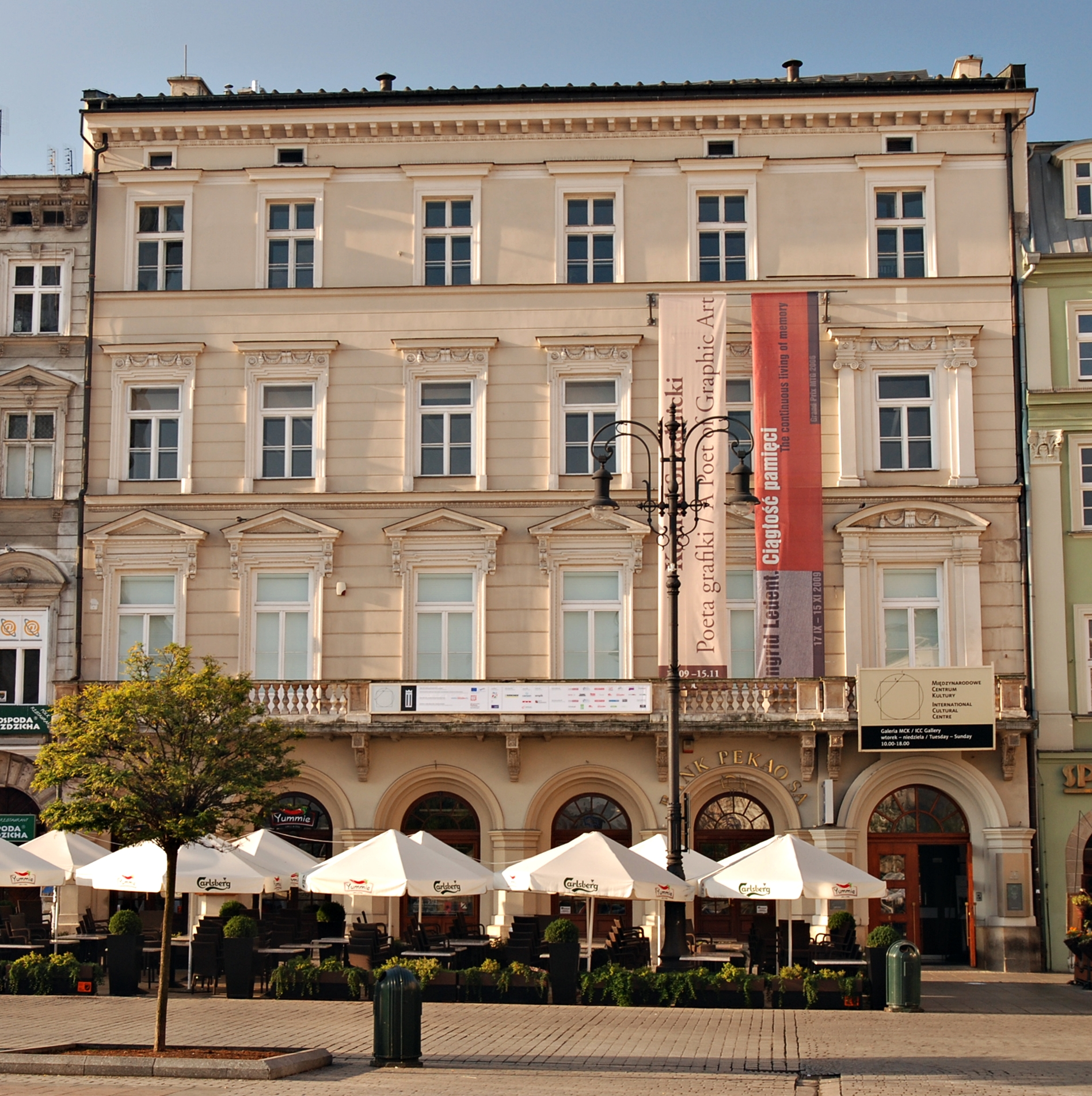 Kamienica Pod Krukami, Rynek Główny 25, Kraków